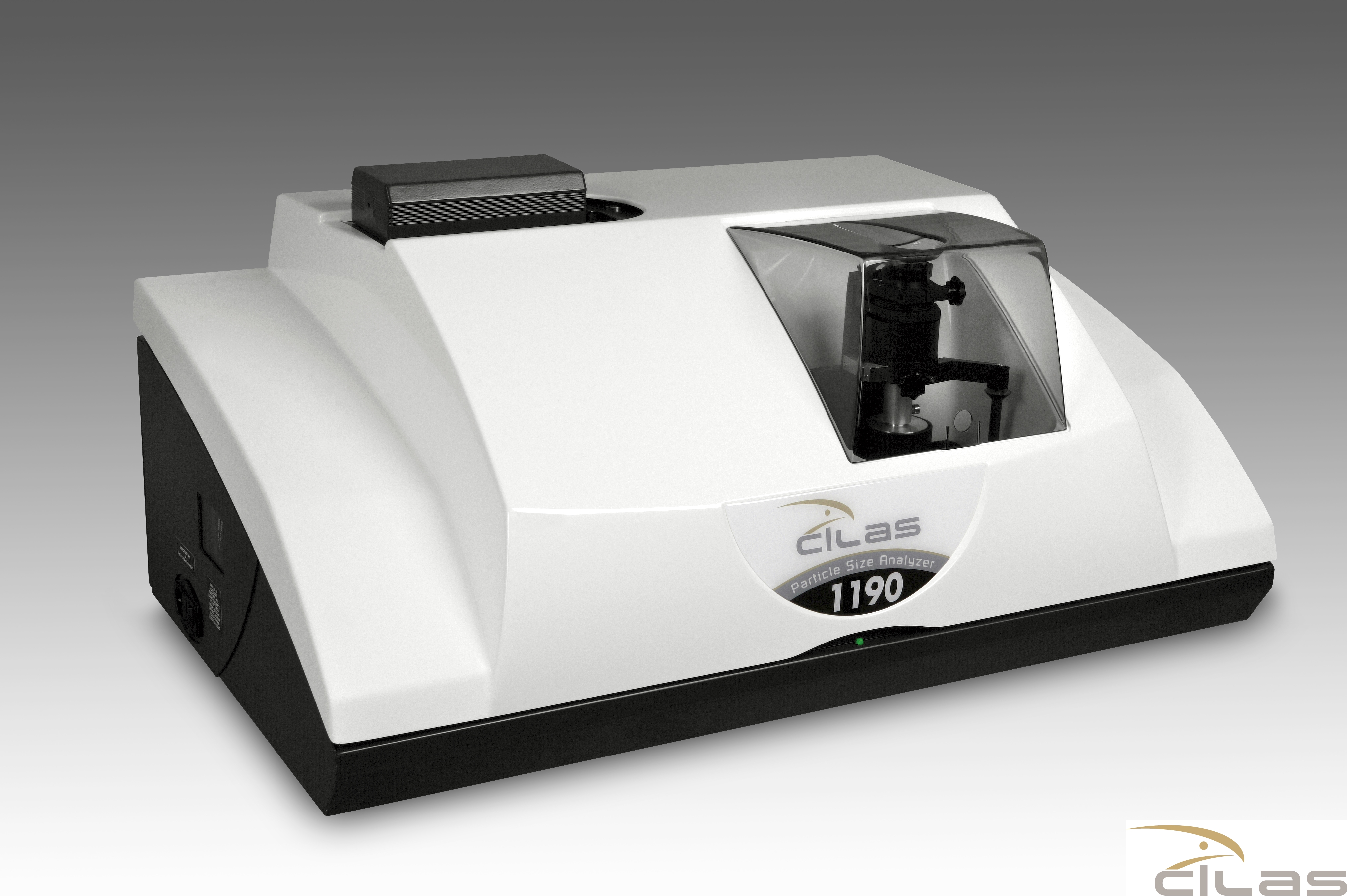 Granulomètre laser 1190 - Analyse granulométrique - Granulométrie - CILAS